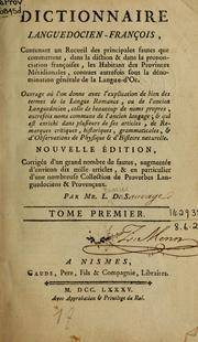 Primièra pagina del diccionari lengadocian francés (1785)